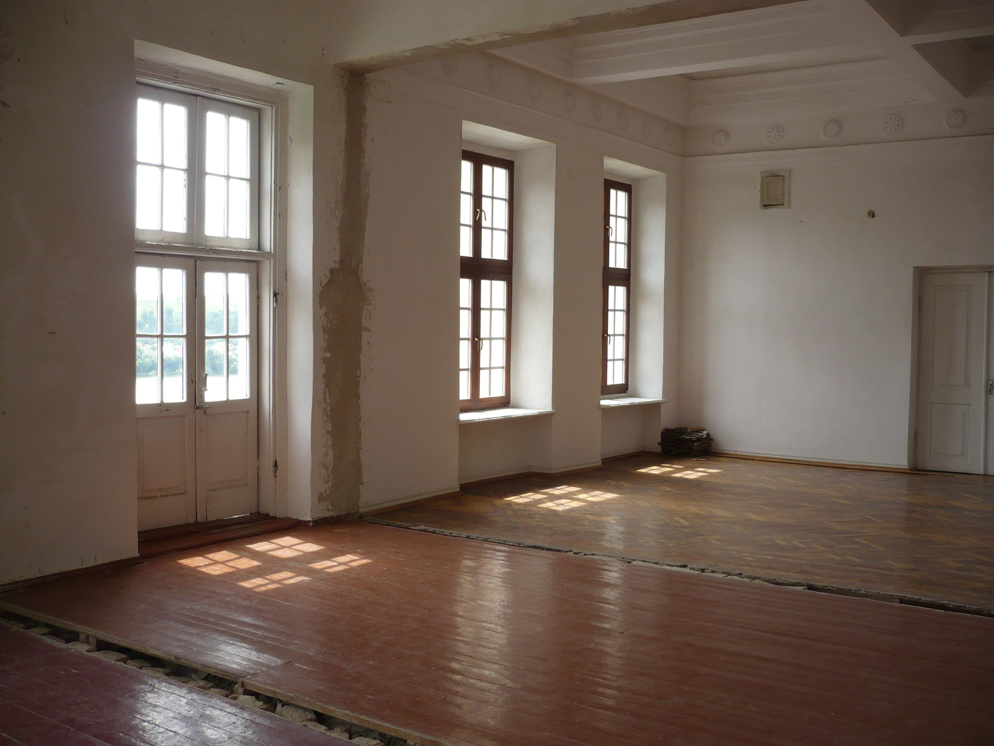 Wiśniowiec, pałac